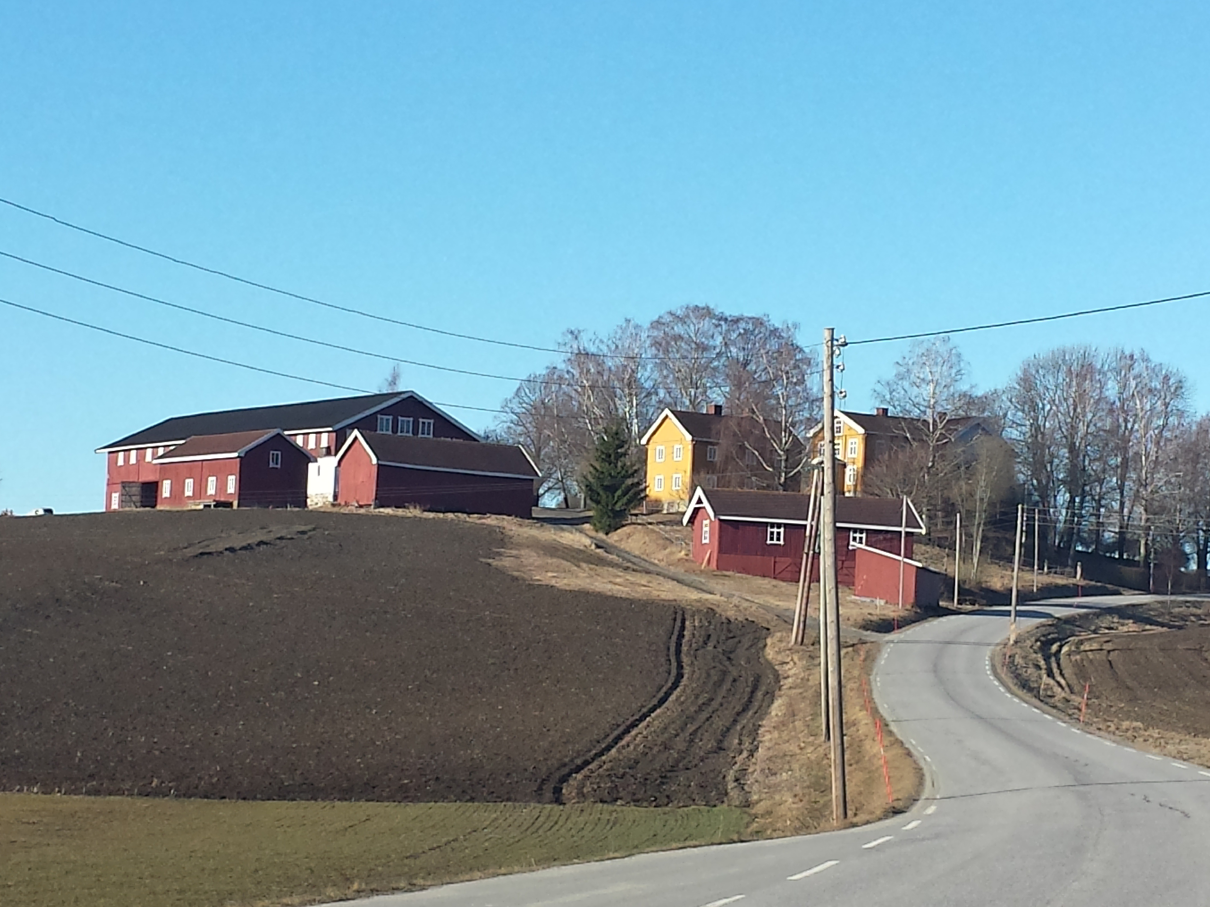 Hesleberg eller Hesselberg er en gammel storgård som ligger i Norderhov